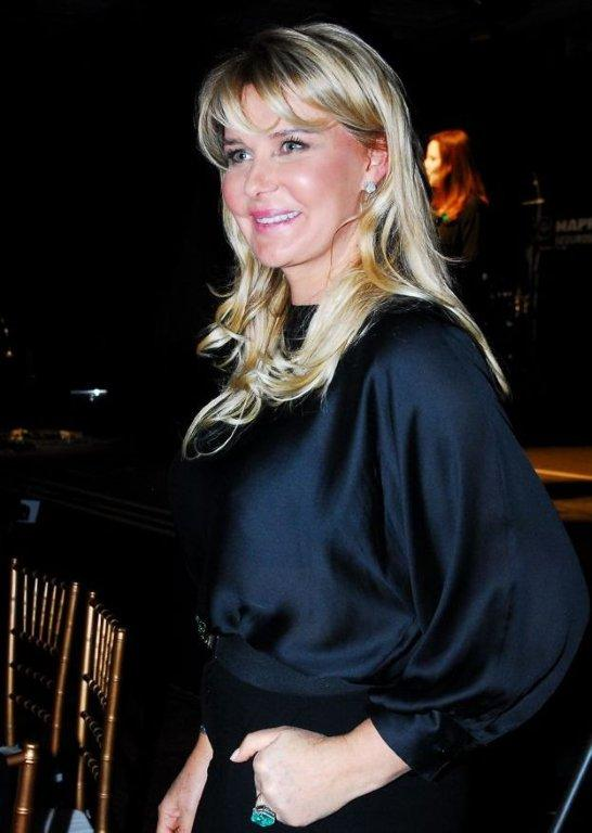 Bia Doria, artista plástica brasileira